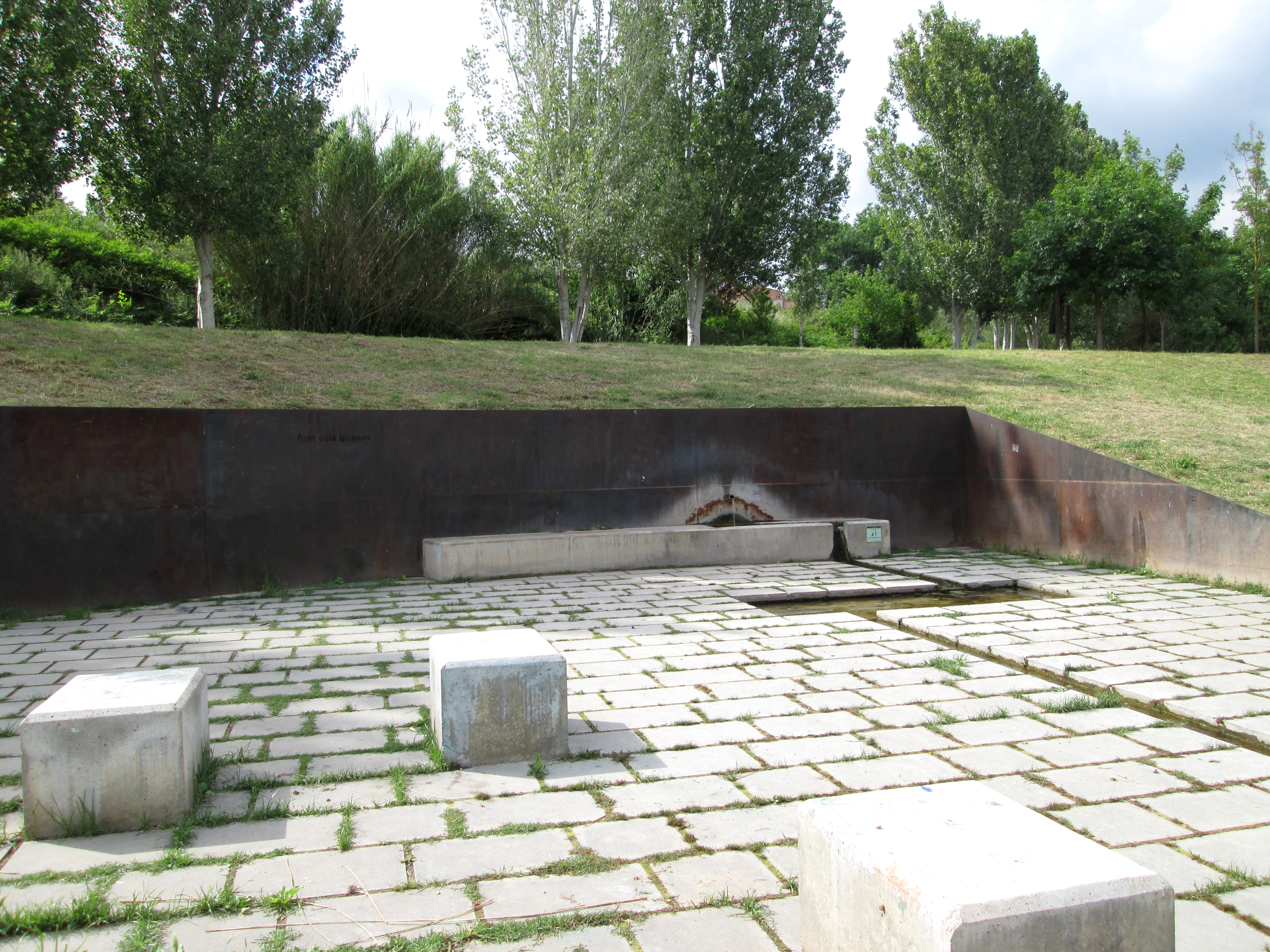 Fuente de los Gitanos. Fuente natural situada en el margen derecho del río ripoll, en Sabadell, Barcelona (España).